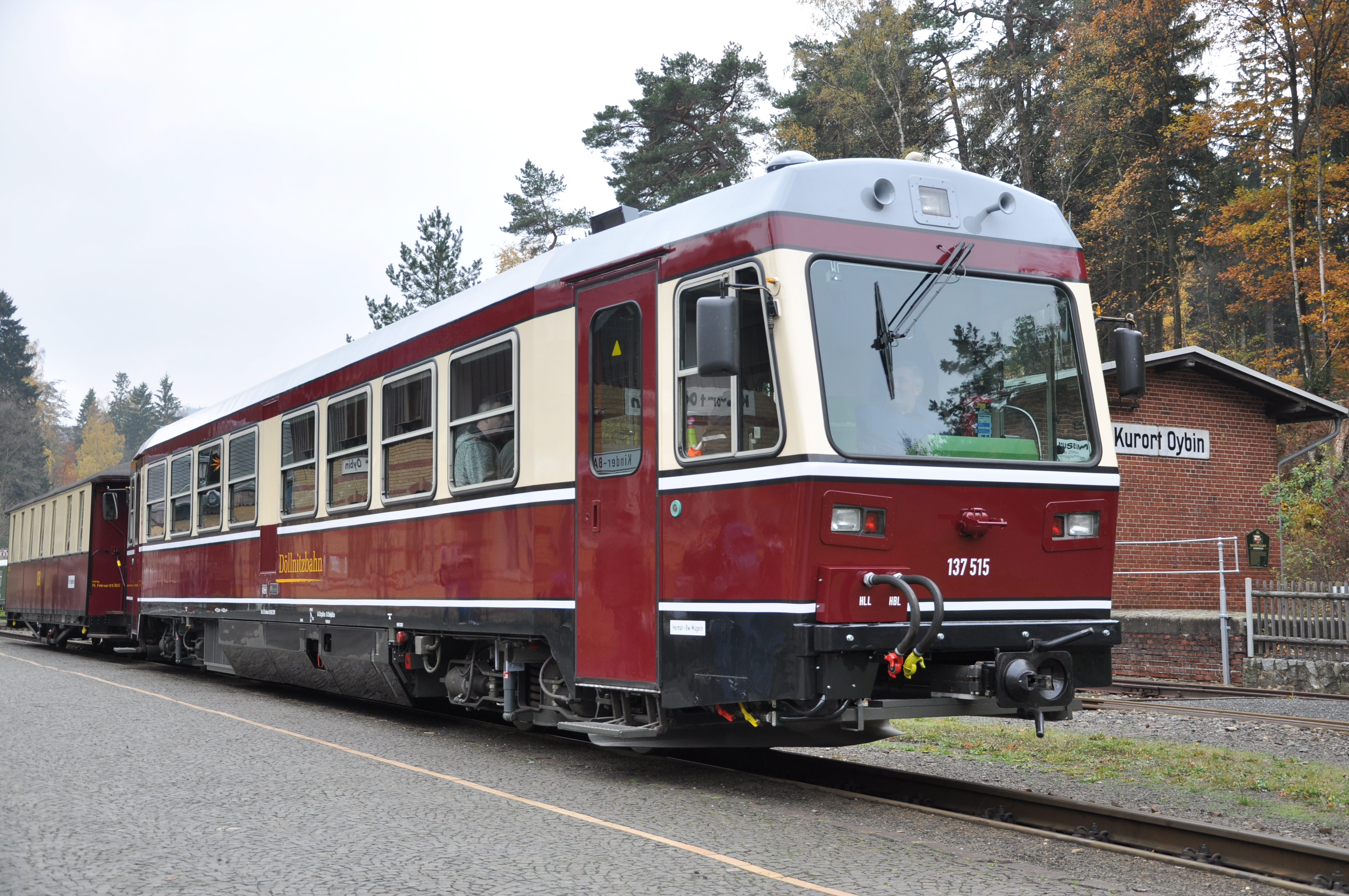 Triebwagen 137 515 (ehem. ÖBB 5090.015) der Döllnitzbahn in Kurort Oybin während der öffentlichen Präsentationsfahrten nach Inbetriebnahme.